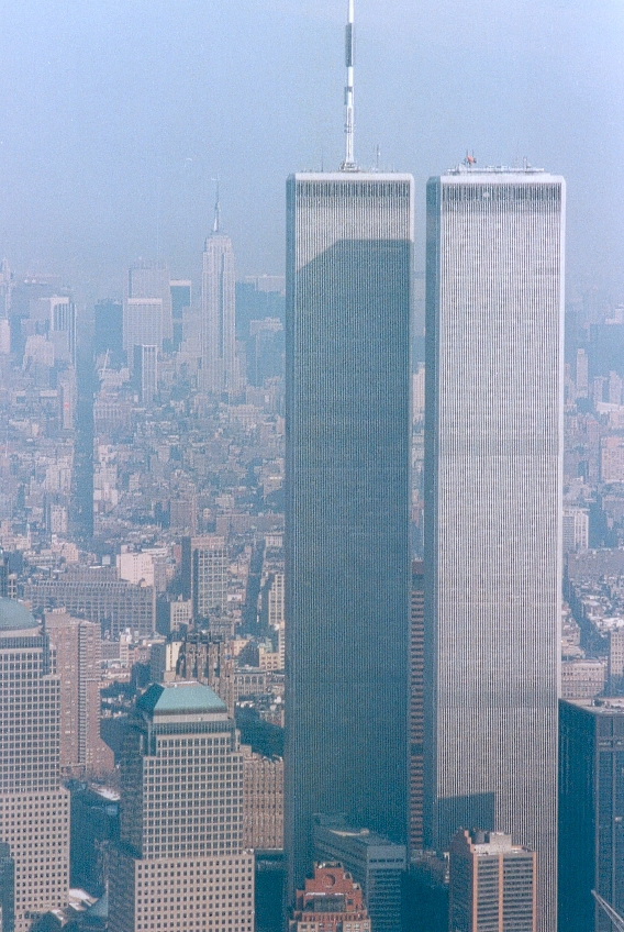 Auteur de la photographie : Georgio Date : Janvier 2001 Sujet : Twin Towers de New York Lieu : USA